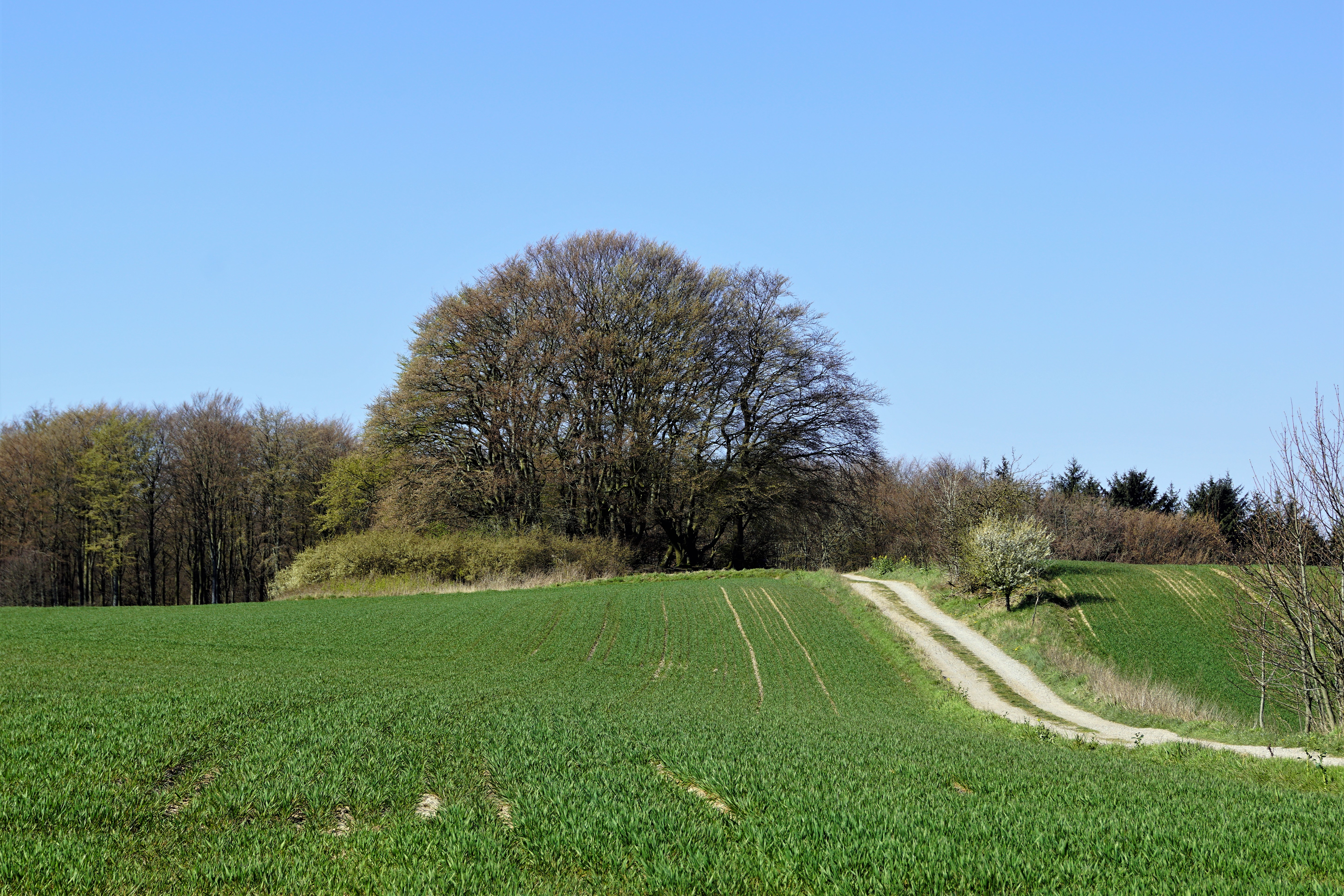 Purhøj set fra øst